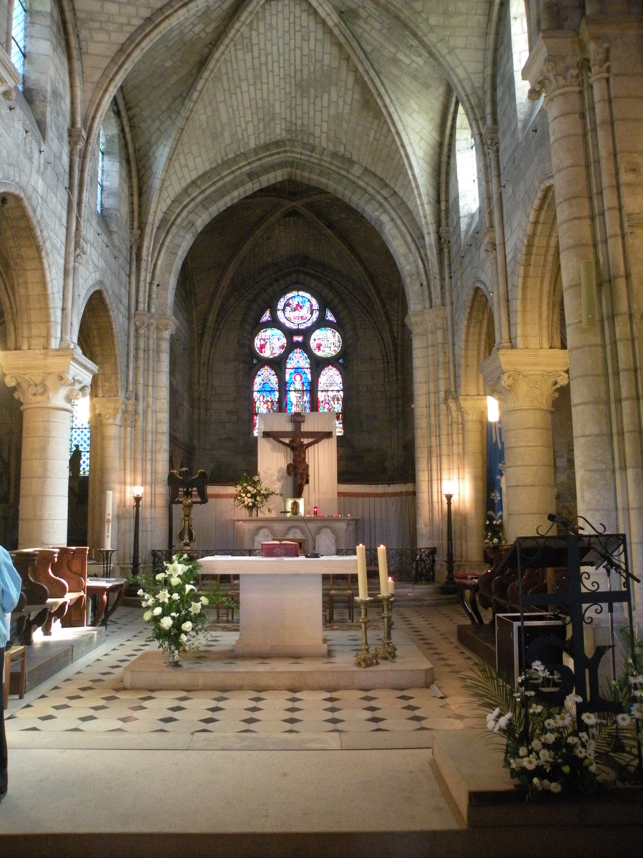 Église Saint-Laurent de Beaumont-sur-Oise